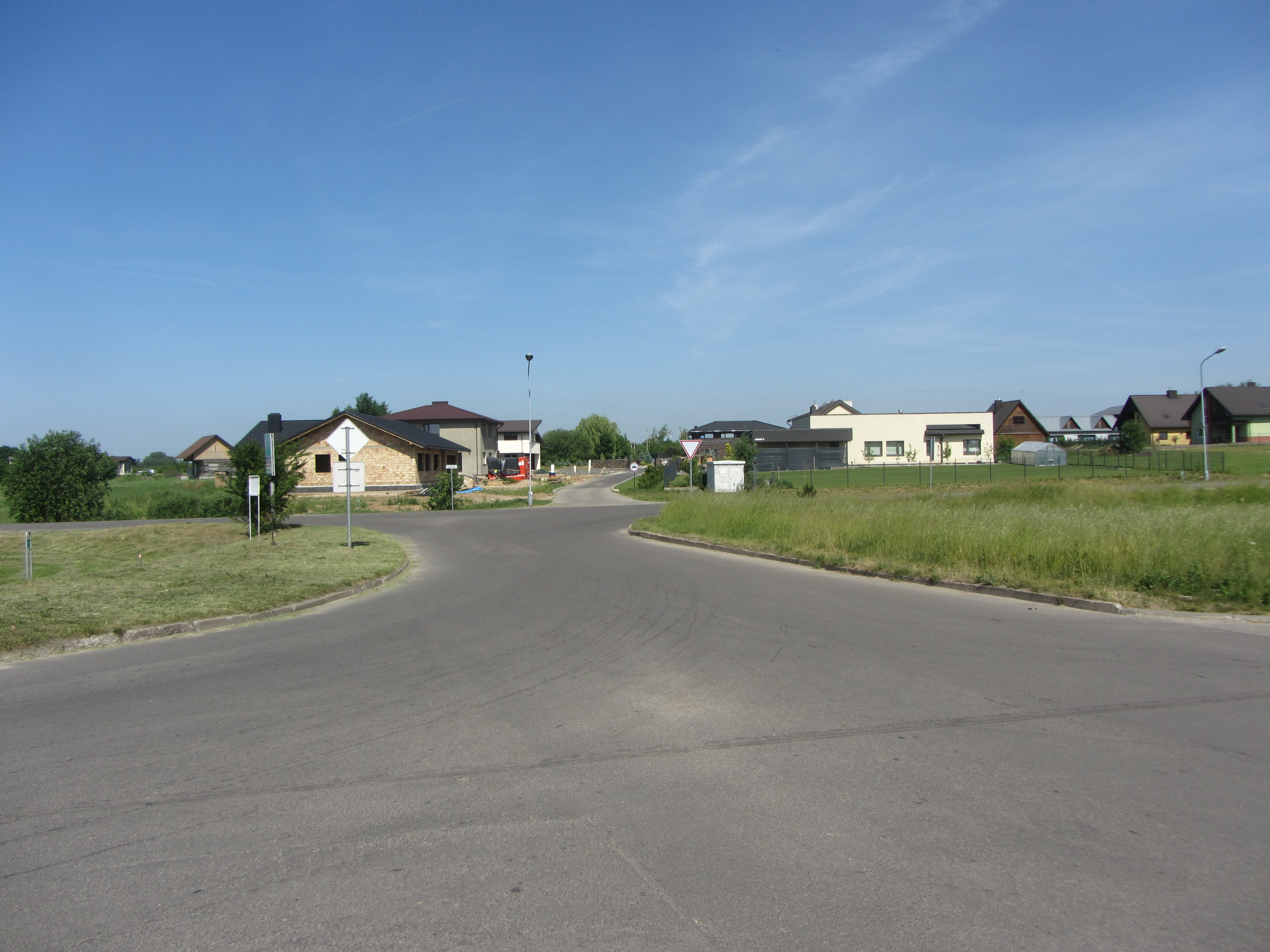 Rumšiškės, Lithuania